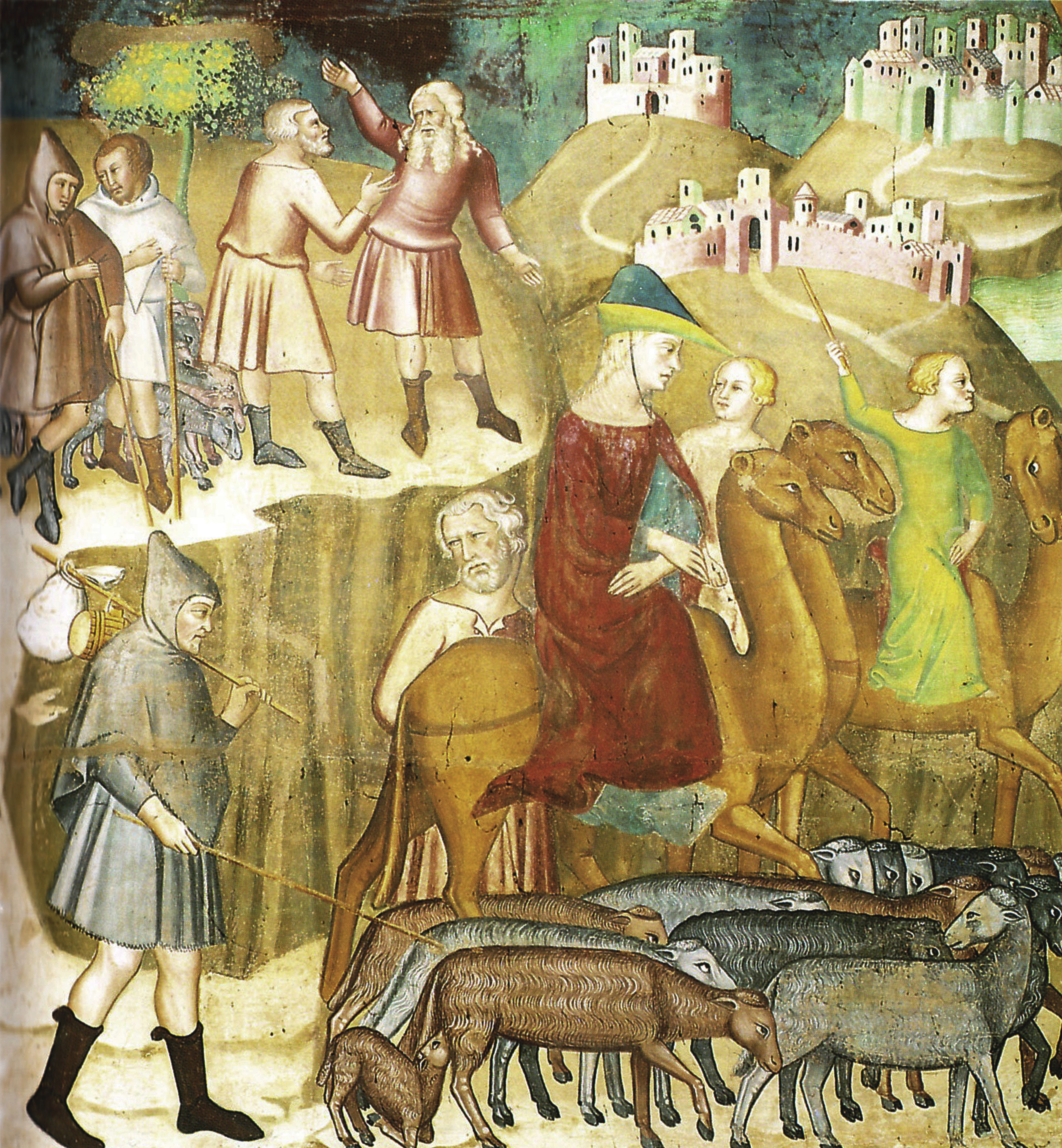 Abramo si divide da Lot nella terra di Canaan, affresco di Bartolo di Fredi (duomo di San Gimignano)